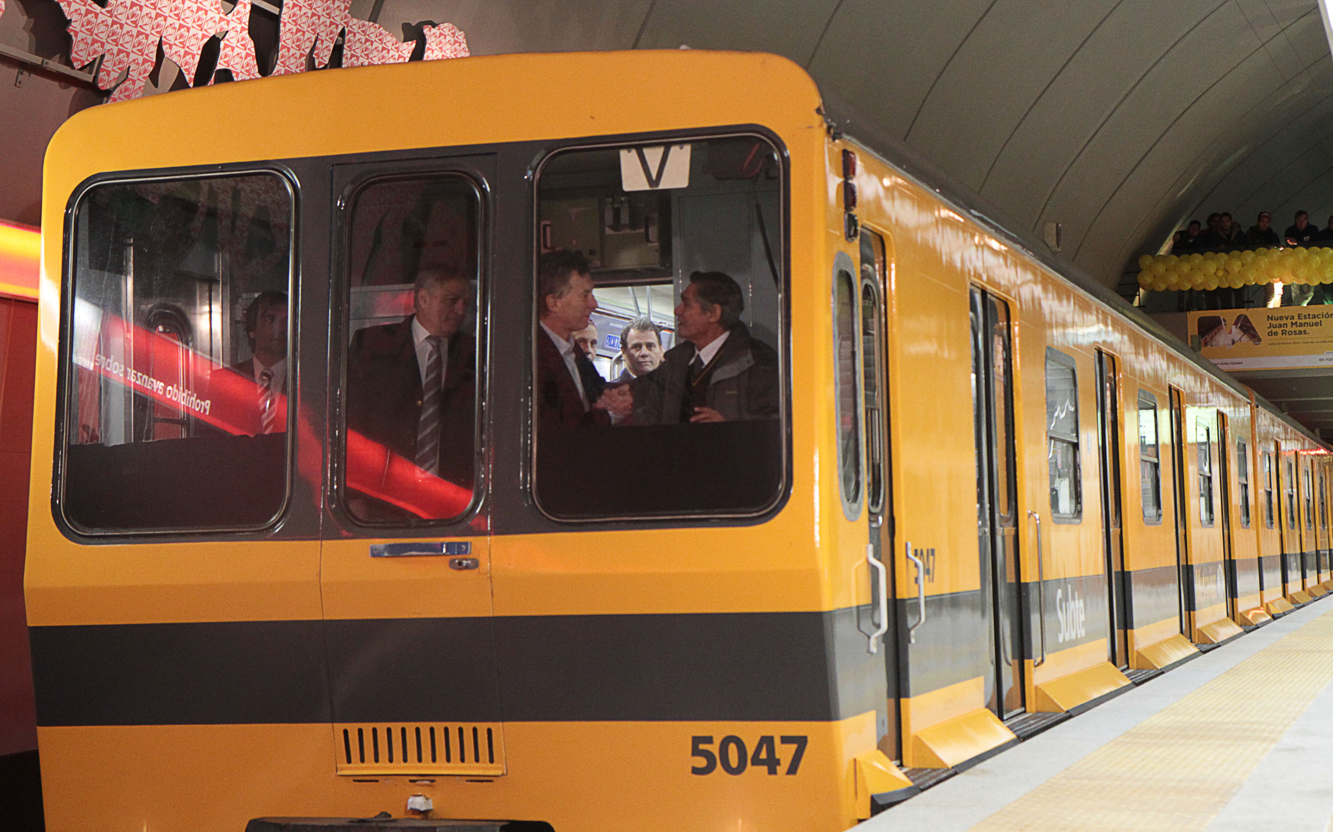 Buenos Aires. Julio 26 de 2013. El jefe de Gobierno de la Ciudad de Buenos Aires, Mauricio Macri, inauguró hoy las estaciones de subterráneos de la línea B Echeverría y J.M. de Rosas. Foto Tony Valdez/GCBA.